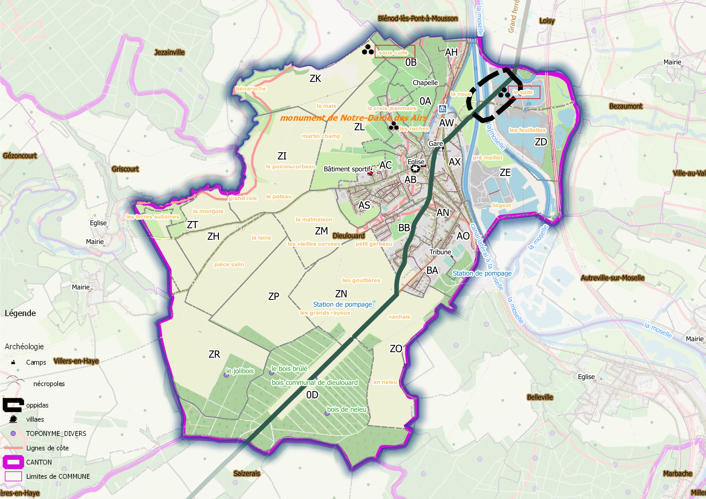 Dieulouard (ban communal) OSM et Qgis, mentions additionnelles.